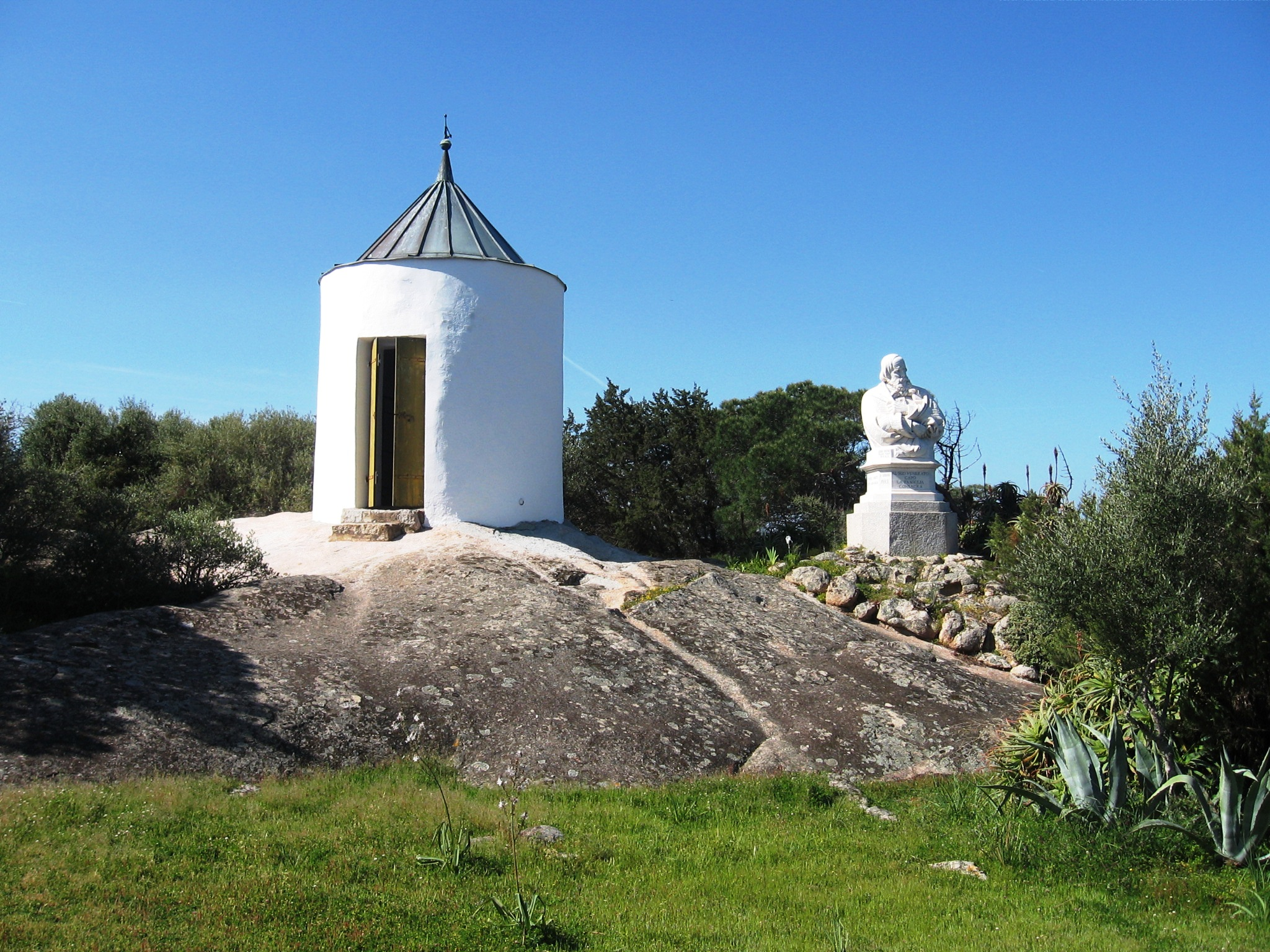 la cappella e il busto di GARIBALDI, al Museo garibaldino di Caprera.